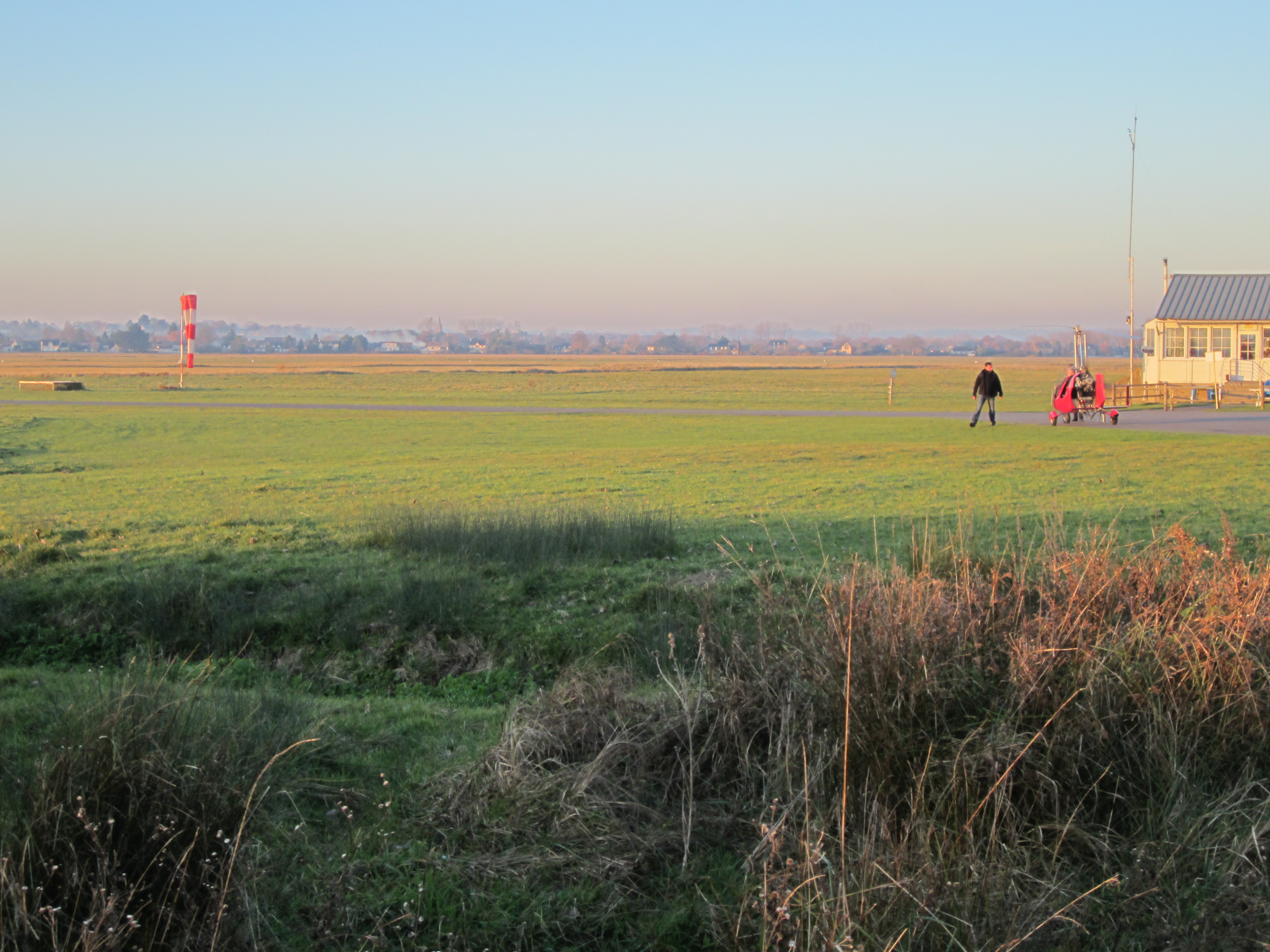 Le Val-Saint-Père, Manche